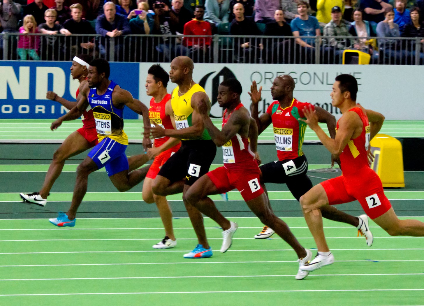 295 finale 60m man